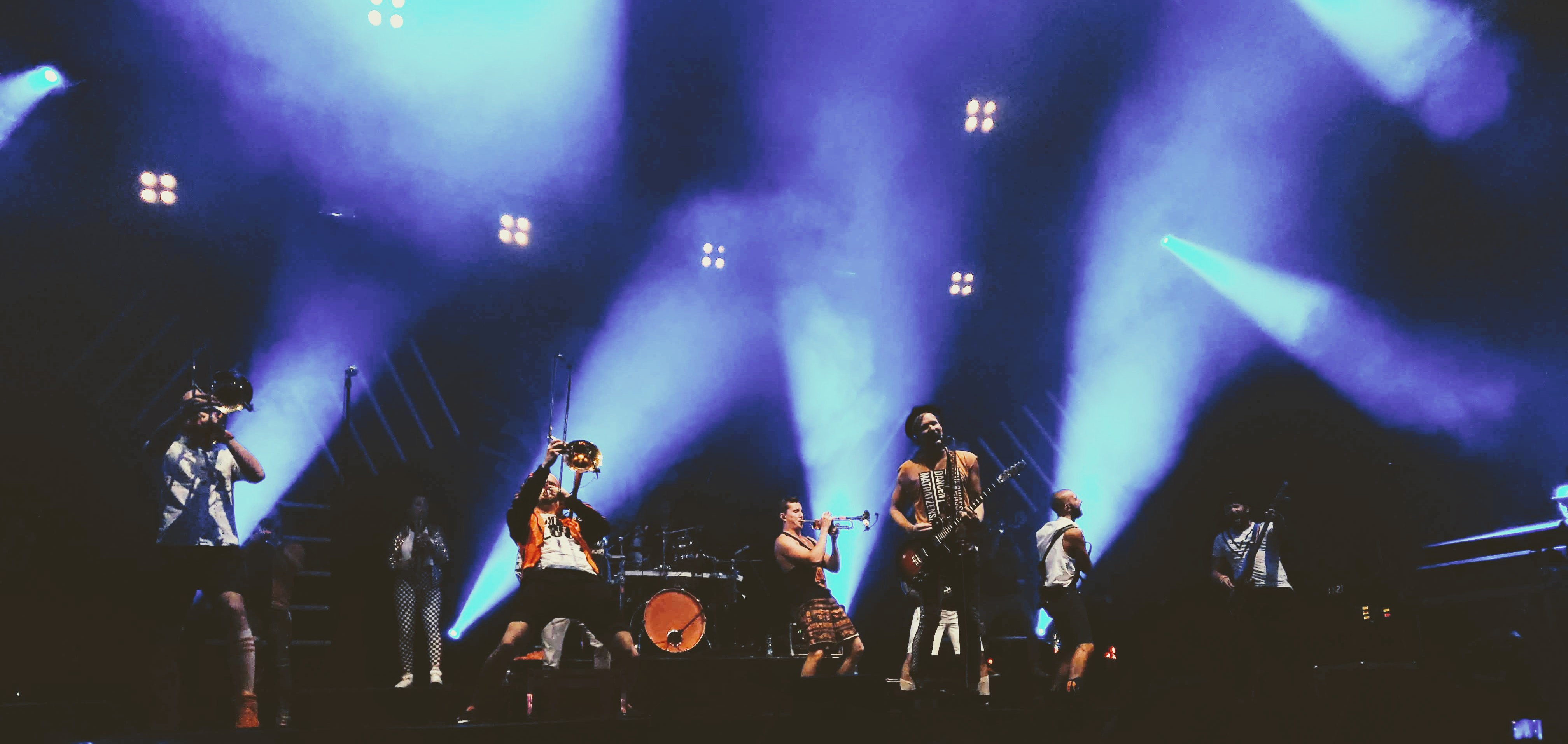 Querbeat auf dem Gamescom City Festival 2018